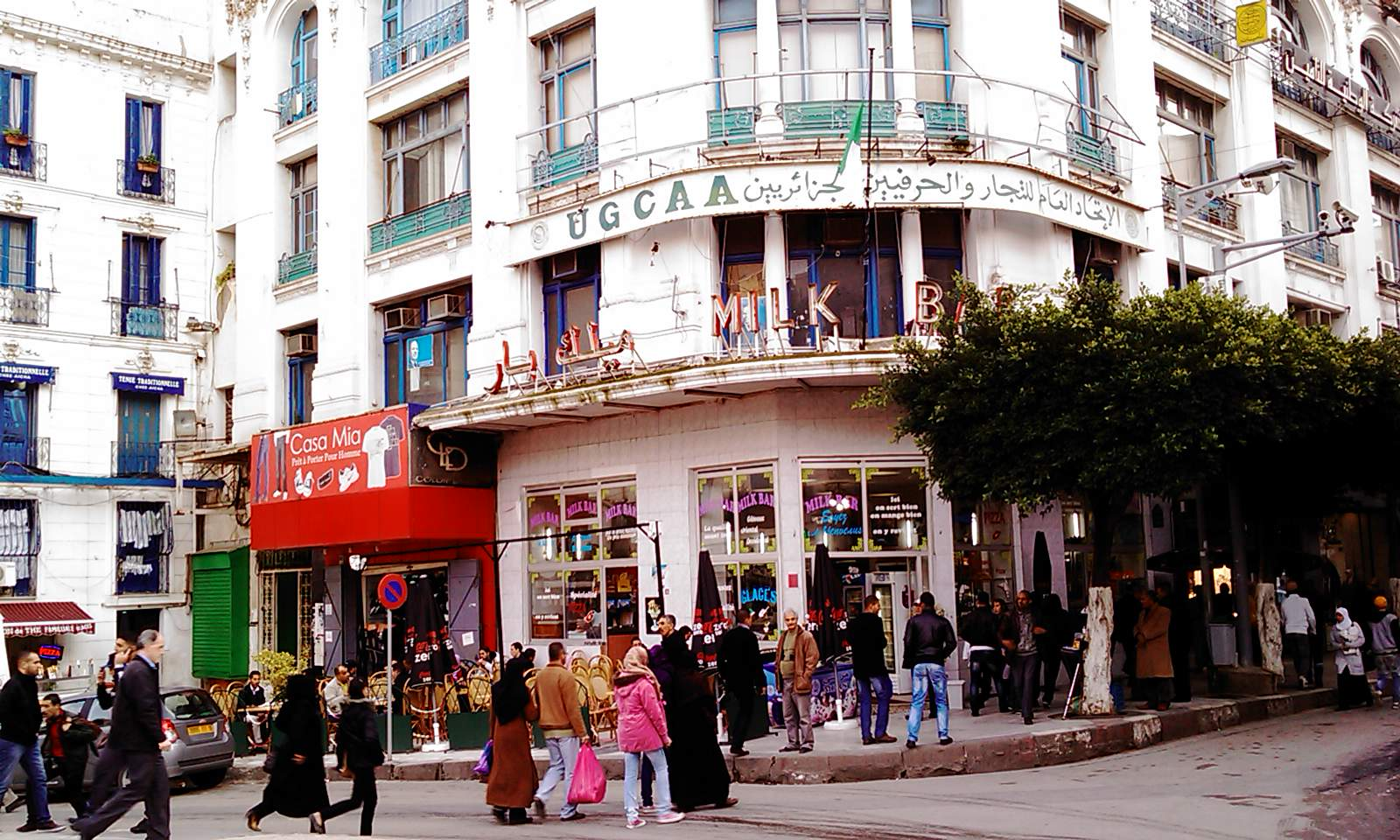 Le Milk Bar à Alger, où s'est produit le spectaculaire attentat, le 30 septembre 1956, bilan : 8 morts, perpétré par la poseuse des bombes Zohra Drif du réseau bombe de Yacef Saadi.